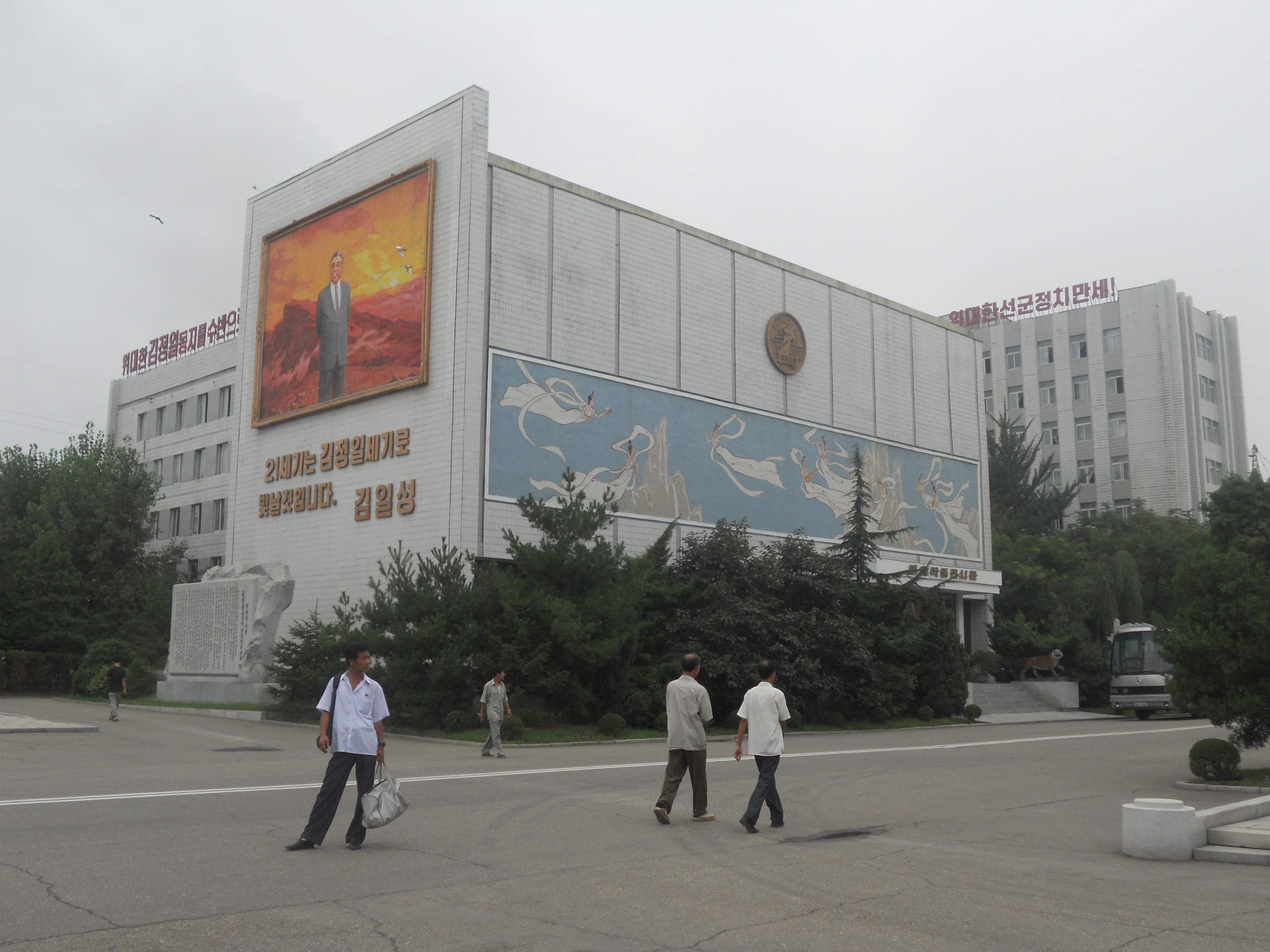 Mansudae Art Studio